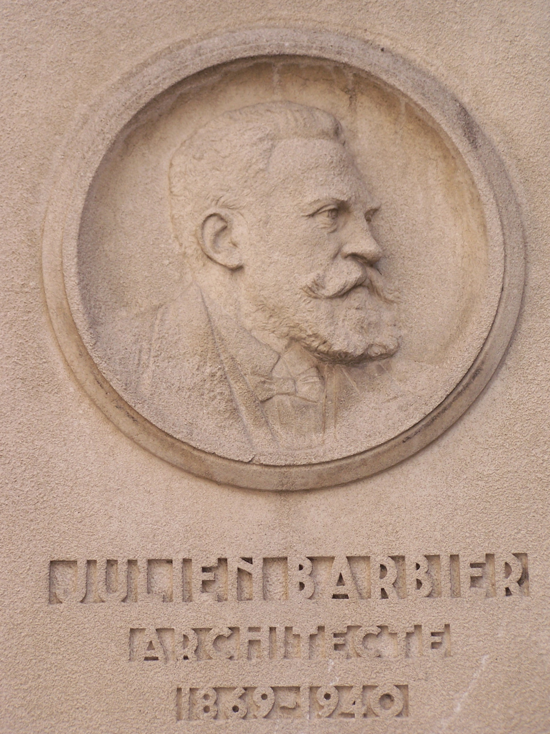 Bas-relief représentant l'architecte Jules Barbier sur le côté de son œuvre, l'église Notre-Dame-des-Otages à Paris réalisée en 1938